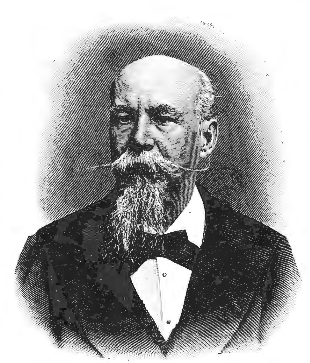 Грузинский, Пётр Николаевич